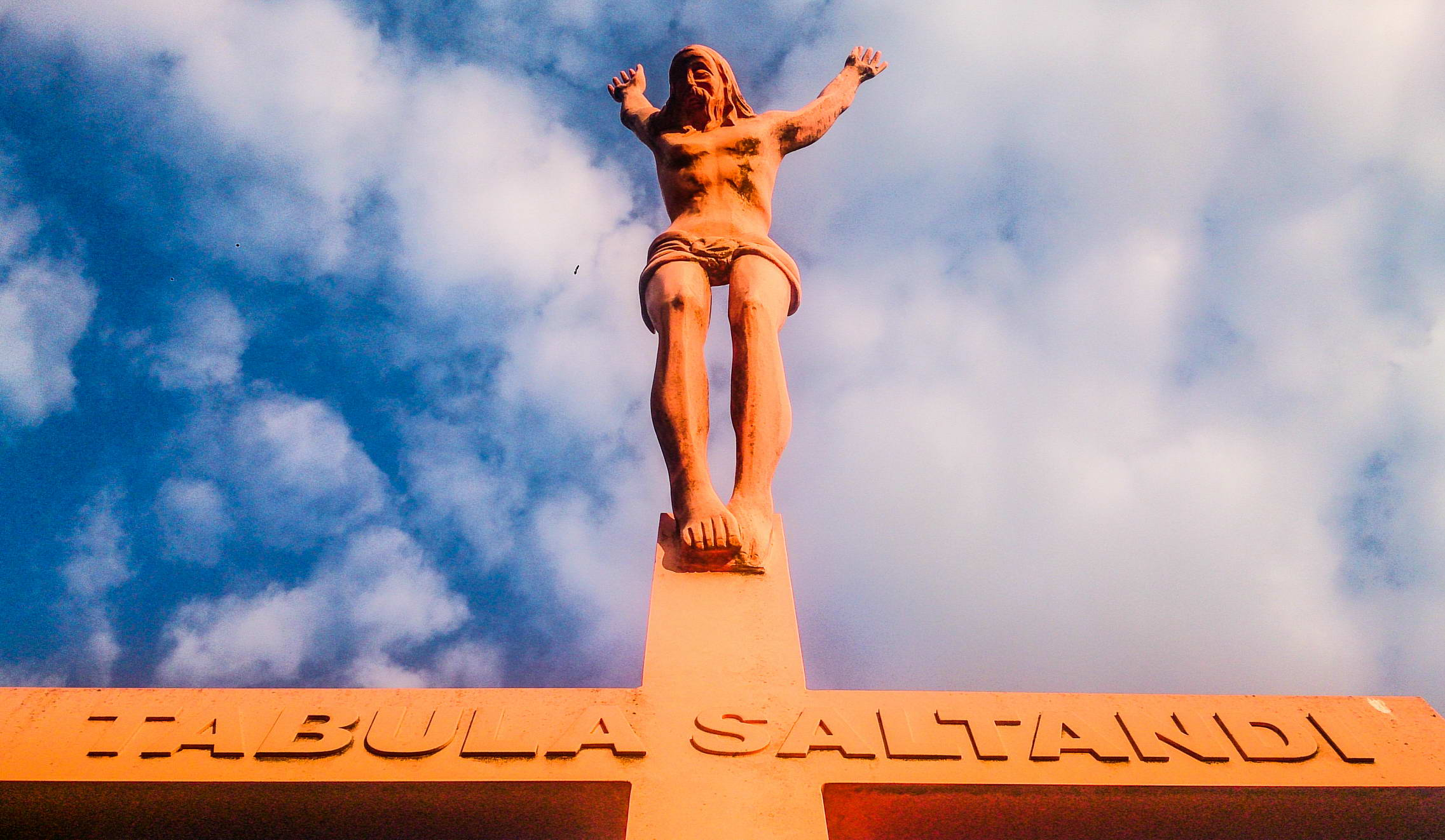 Graz – Kalvarienberg, Illusionen am barocken Mysterientheater der Jesuiten und Führung durch den Luftschutzstollen Dieses Bild wurde anlässlich des österreichischen Tags des Denkmals 2014 in der Steiermark eingereicht.